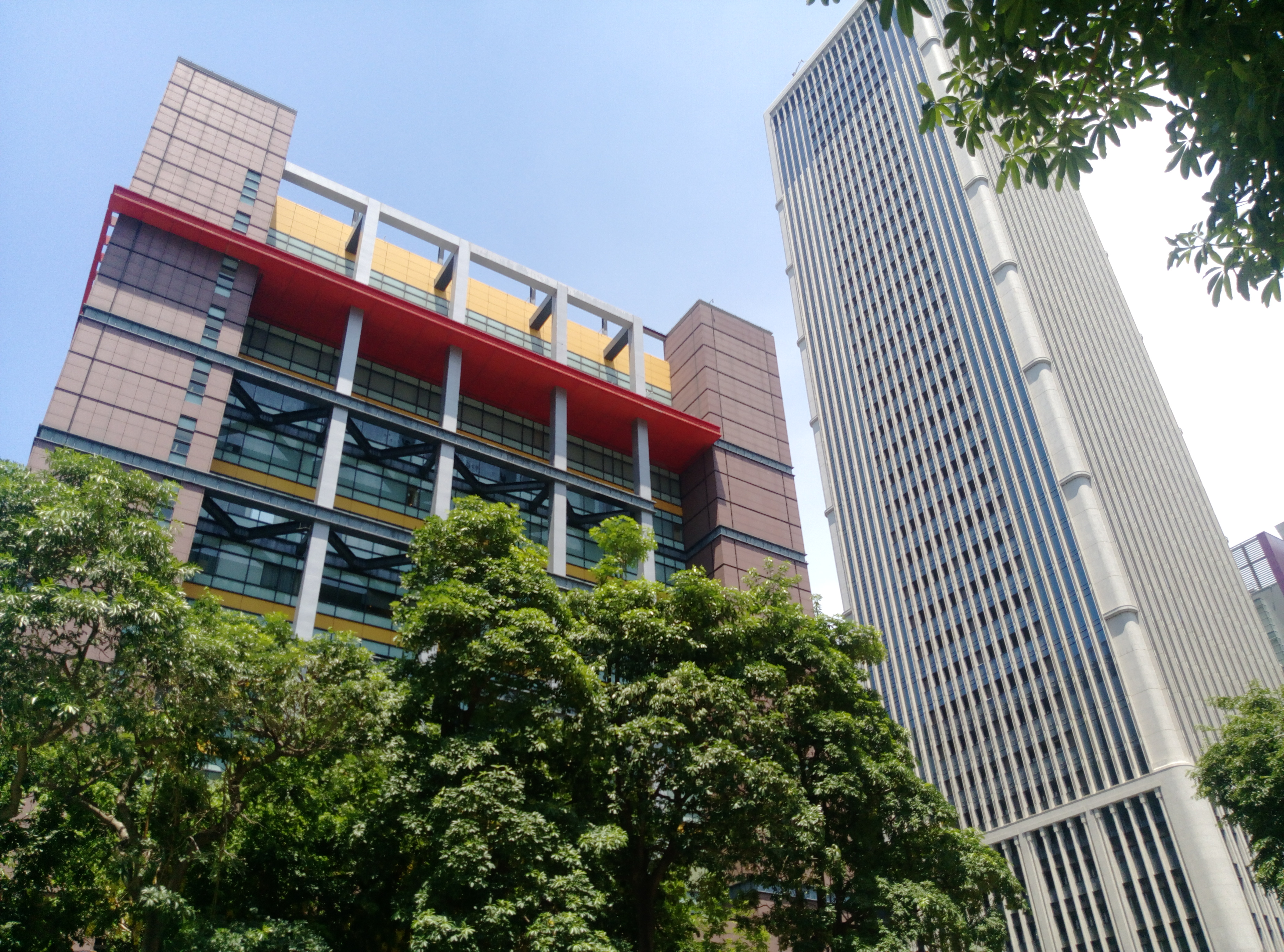 新光三越台中中港店與聯聚中雍大廈。